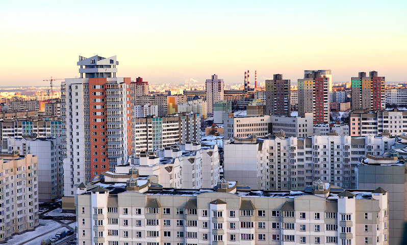 Мінск з вышыні